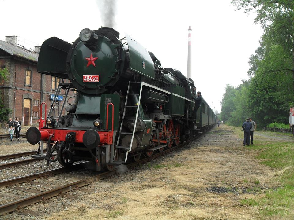 Staré nádraží v Karviné